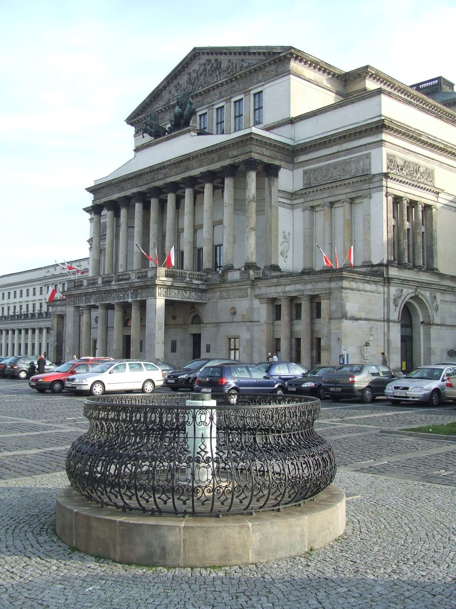 Południk warszawski, plac Teatralny, Warszawa